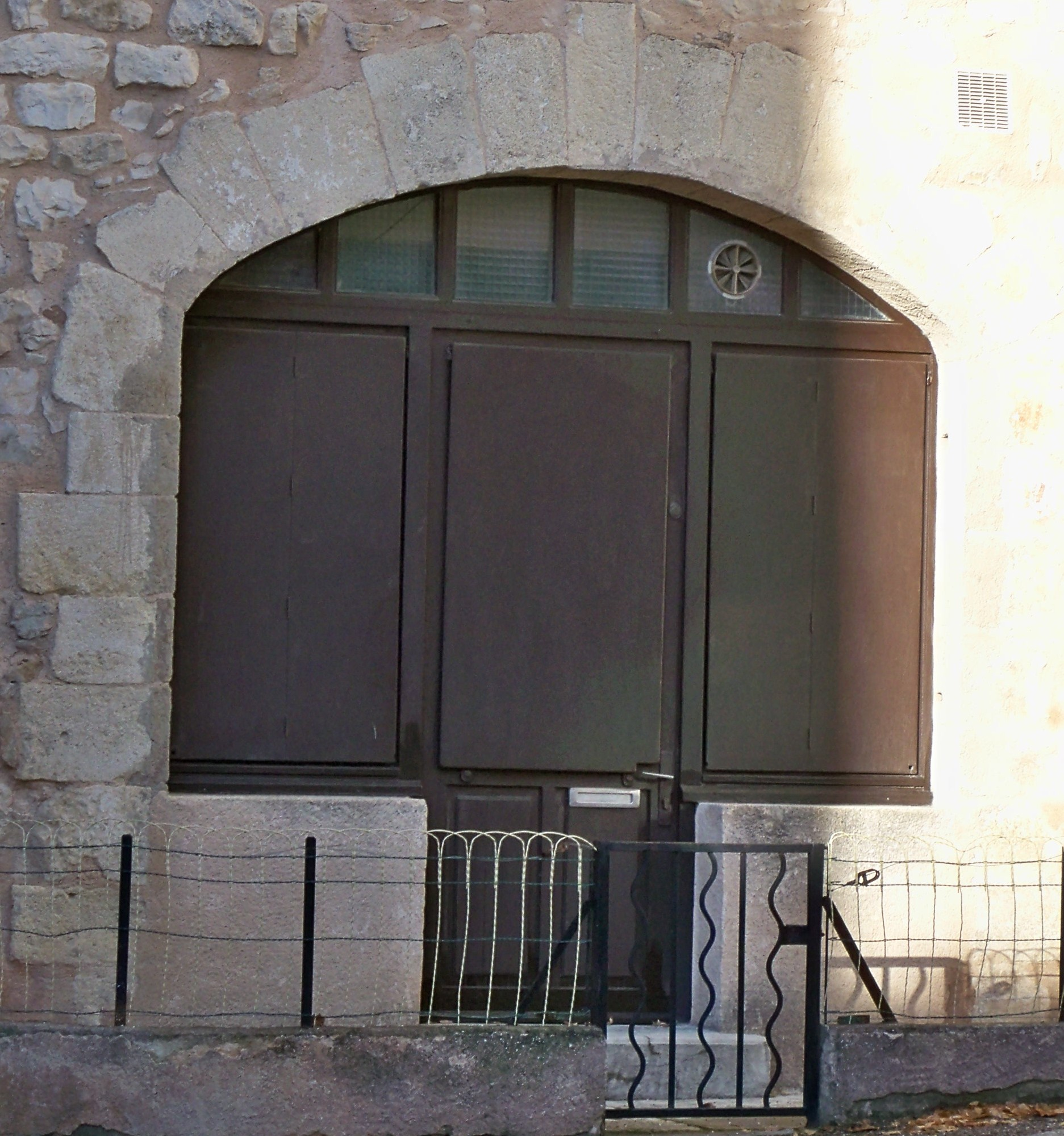 ancienne échoppe à Sault (Vaucluse)